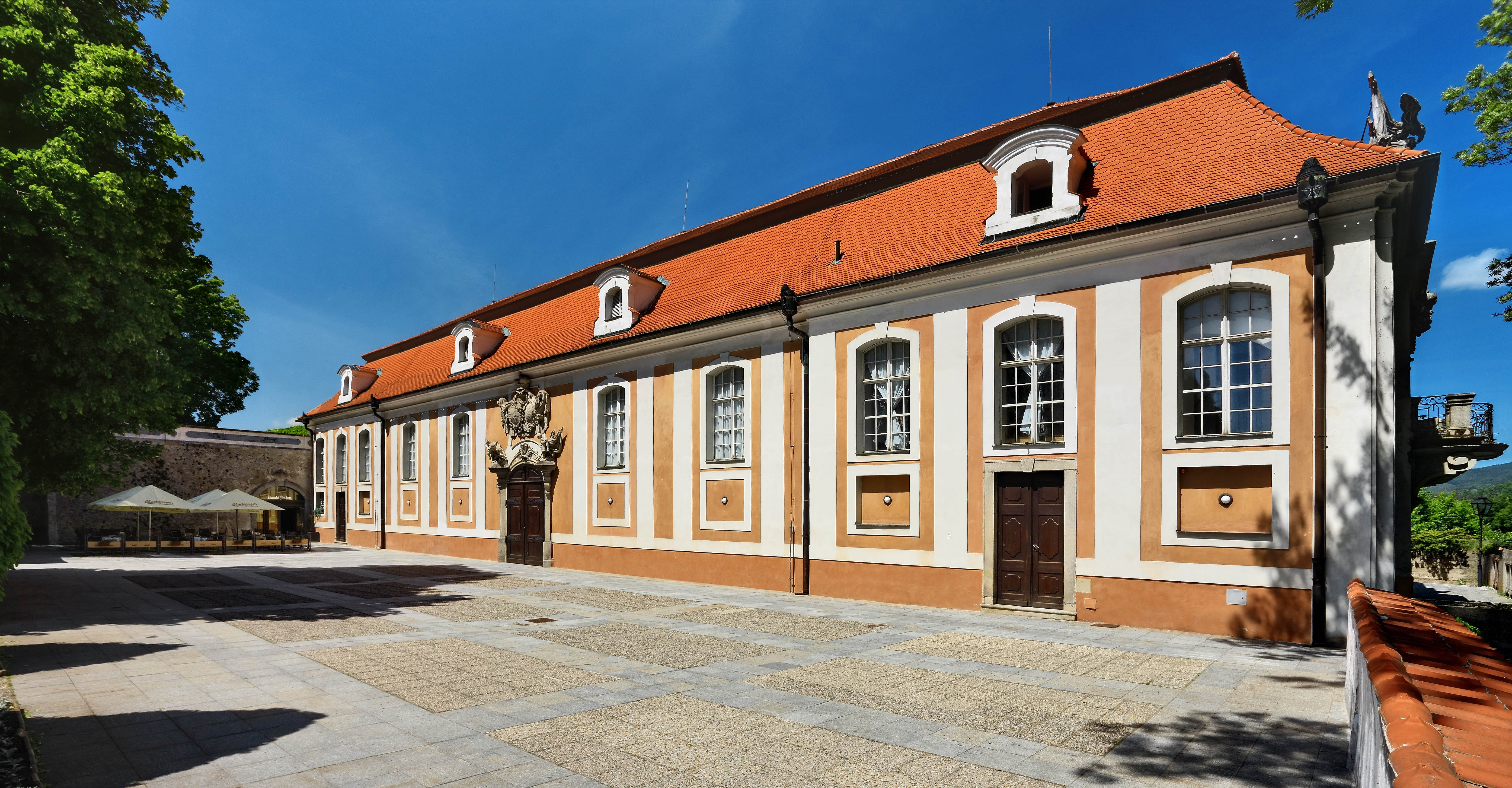 Denní pohled na Zámeckou jízdárnu